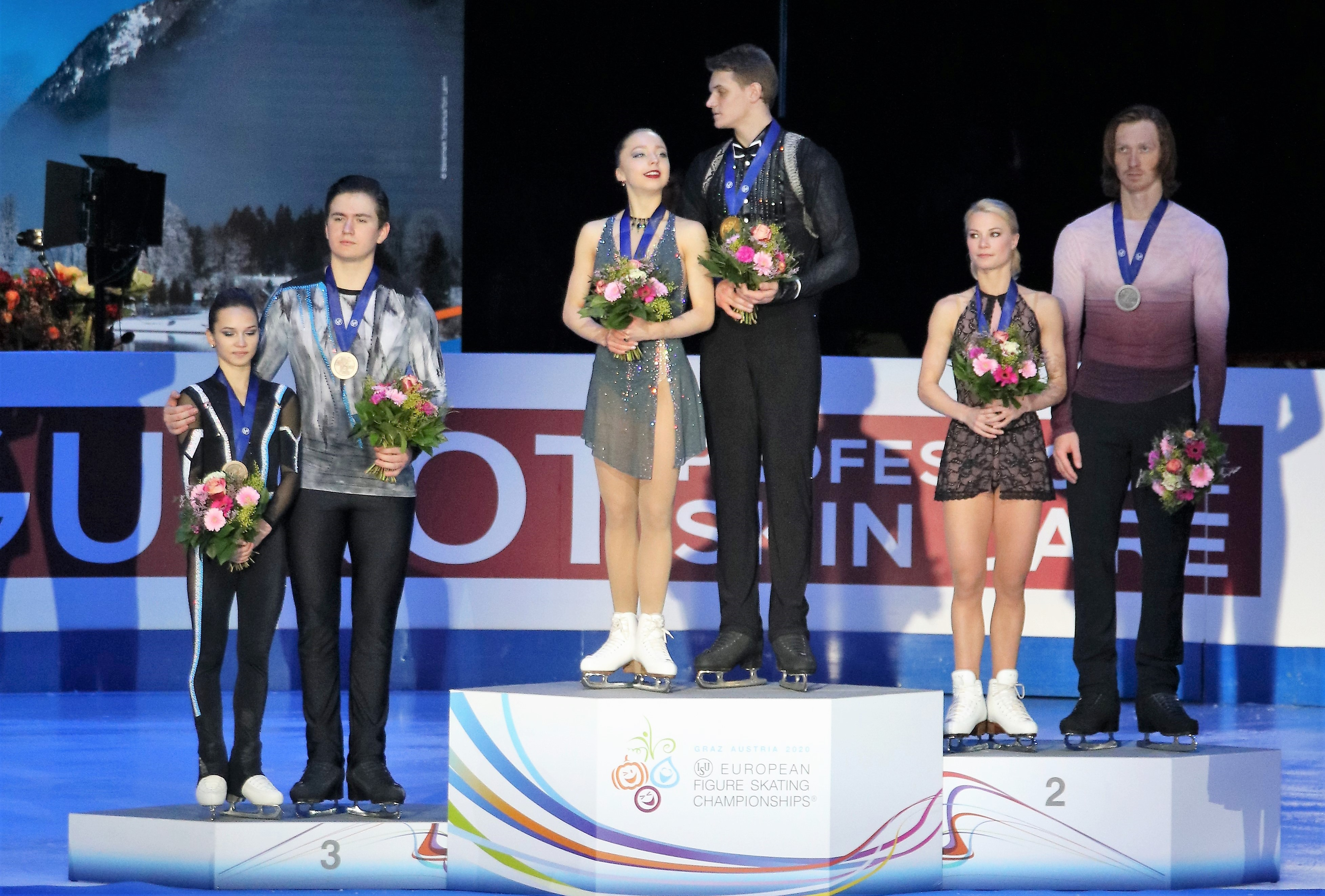 Церемония награждения спортивных пар на чемпионате Европы по фигурному катанию 2020